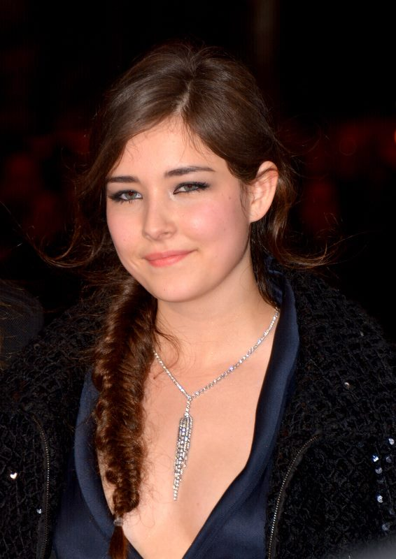 Tuğba Sunguroğlu à la cérémonie des César